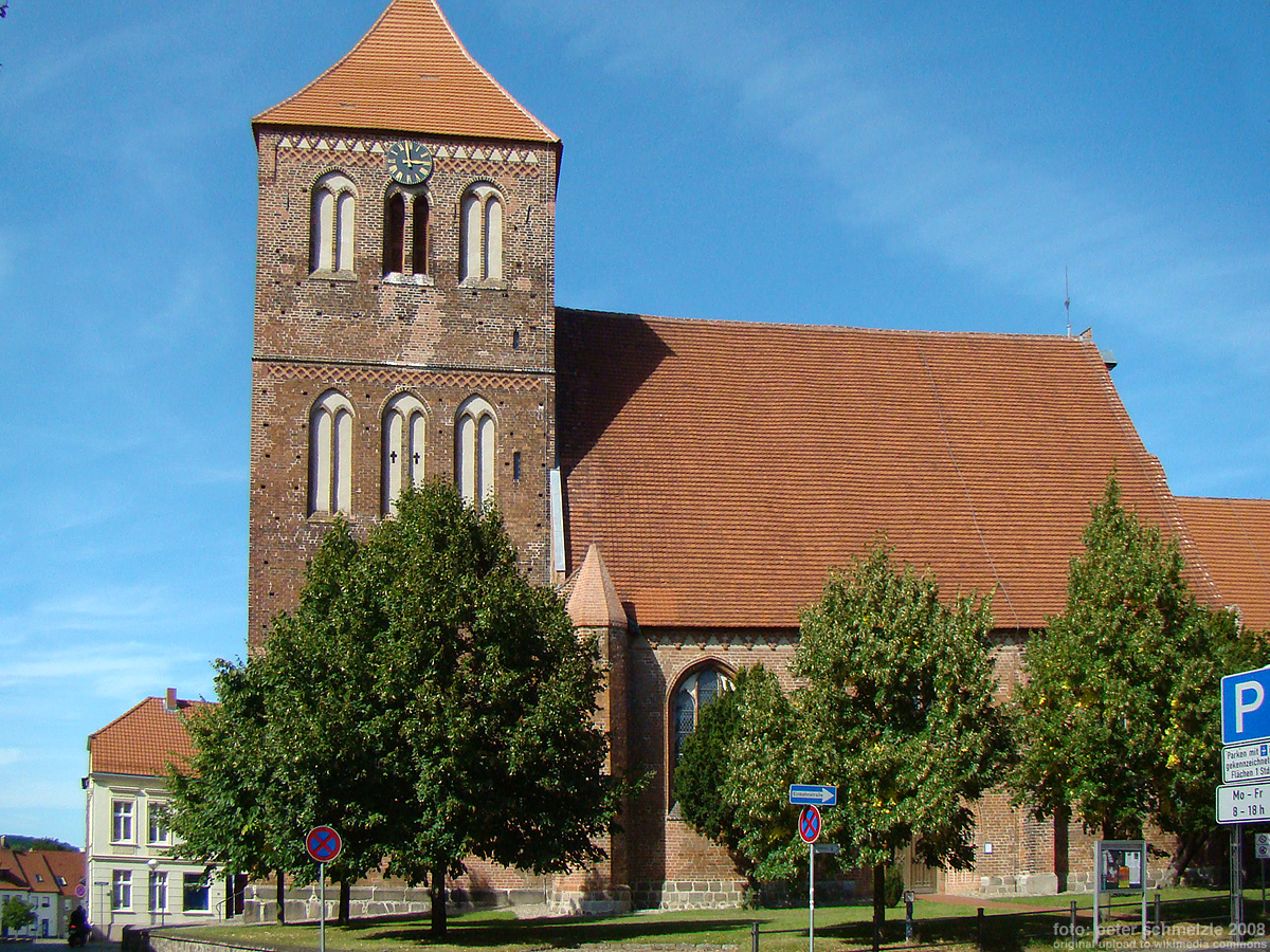 Kirche in Teterow